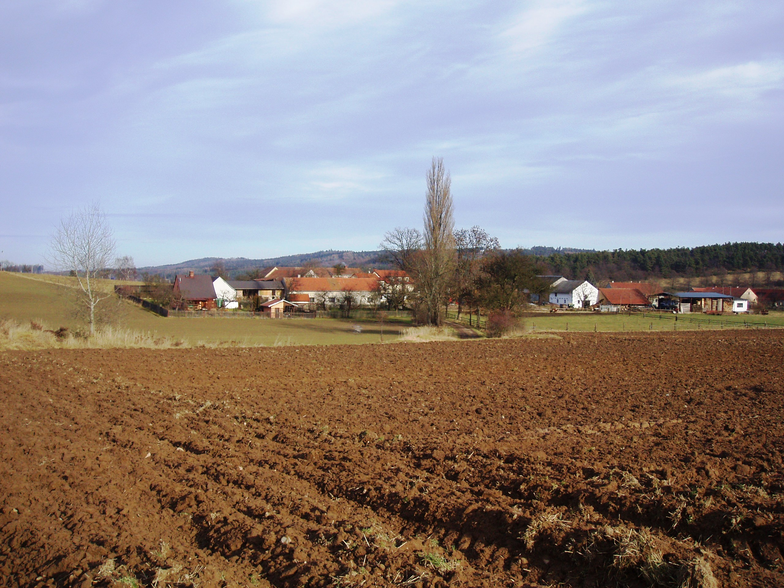 Drhovce - obec u Drhov